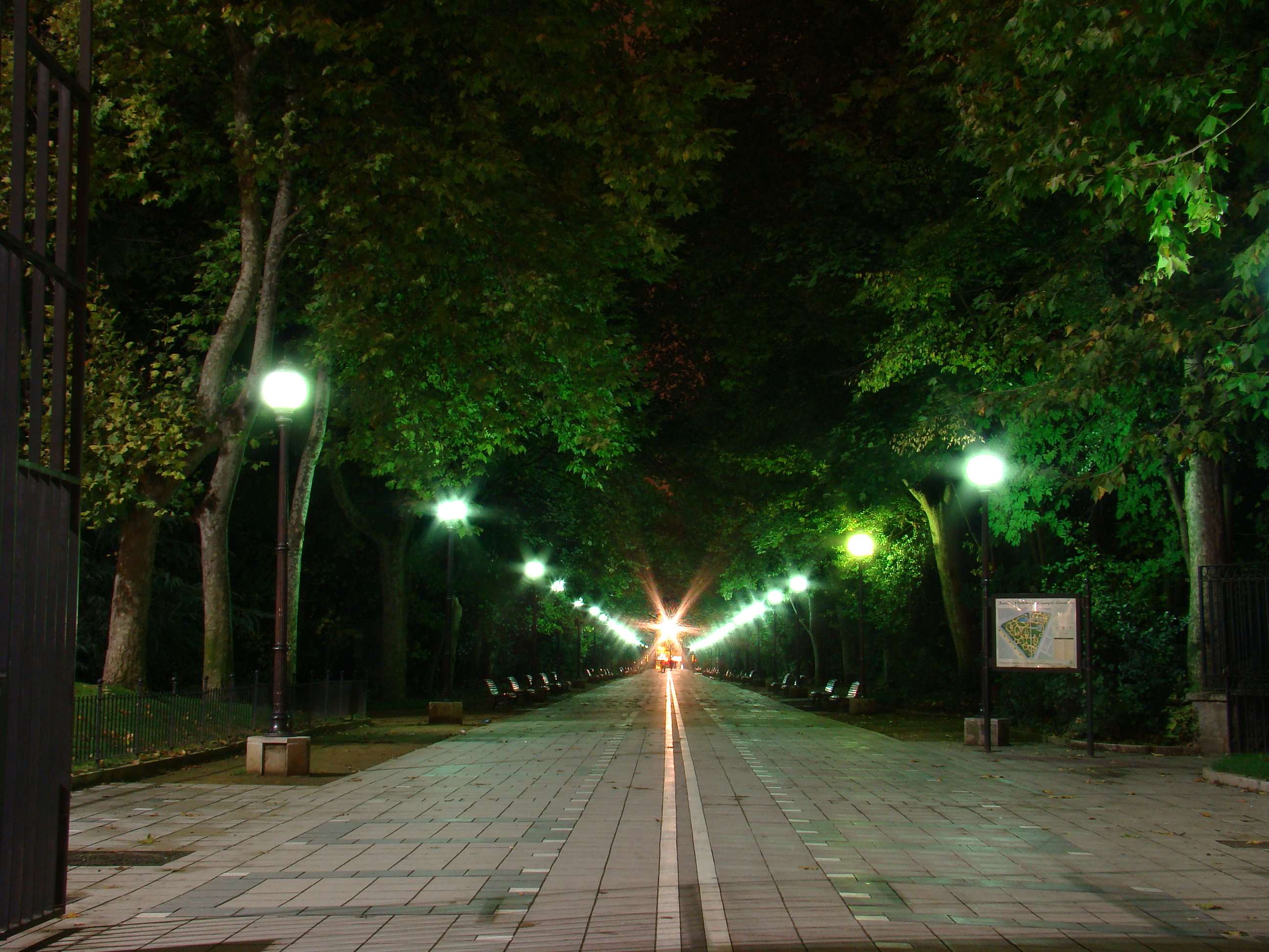 Vista nocturna del Paseo del Príncipe en el Campo Grande de Valladolid, España.